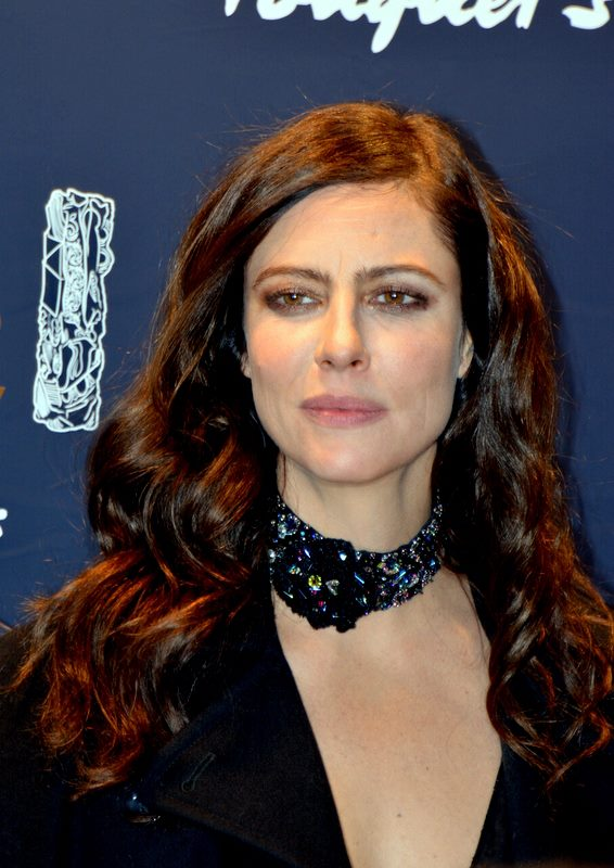 Anna Mouglalis à la cérémonie des César